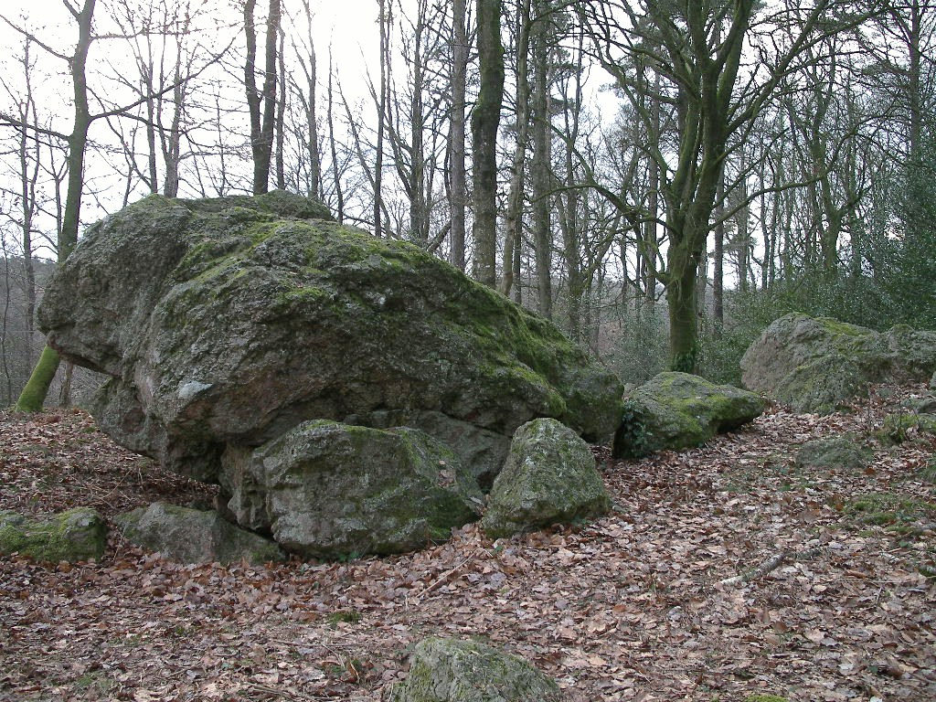 Dolmen de la Pierre de Dialan à Jurques